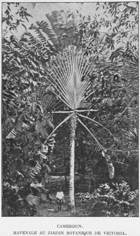 Cameroun. Ravenale au jardin botanique de victoria. From Missions de Gironcourt en Afrique occidentale, 1908/1909 - 1911/ 1912; documents scientifiques, publies avec le concours de l'Academie des sciences (Fonds Bonaparte), de l'Academie des inscriptions et belles-lettres, et de la Societe de geographie (published 1920).